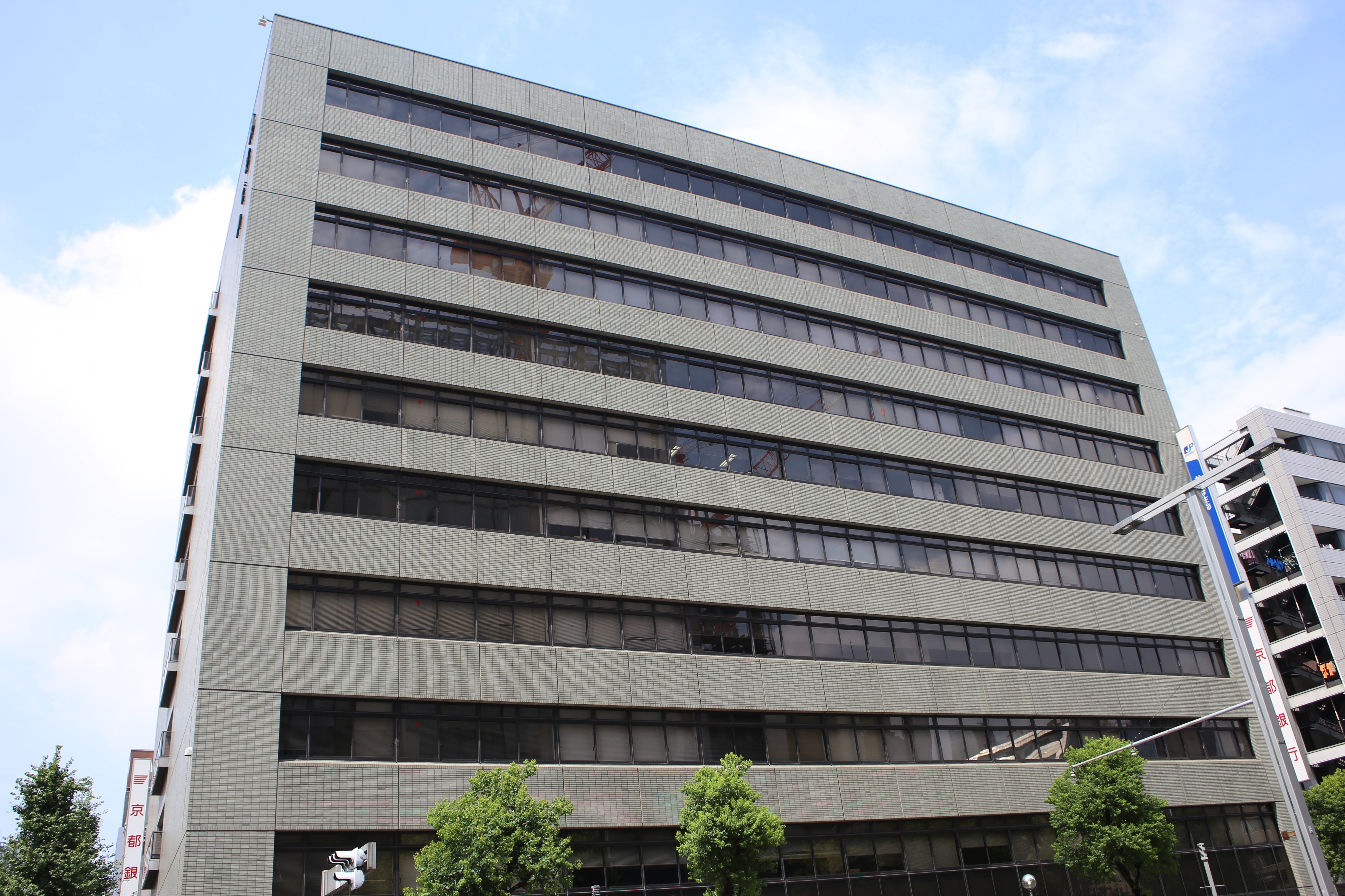 名古屋市中区錦三丁目 御幸ビル